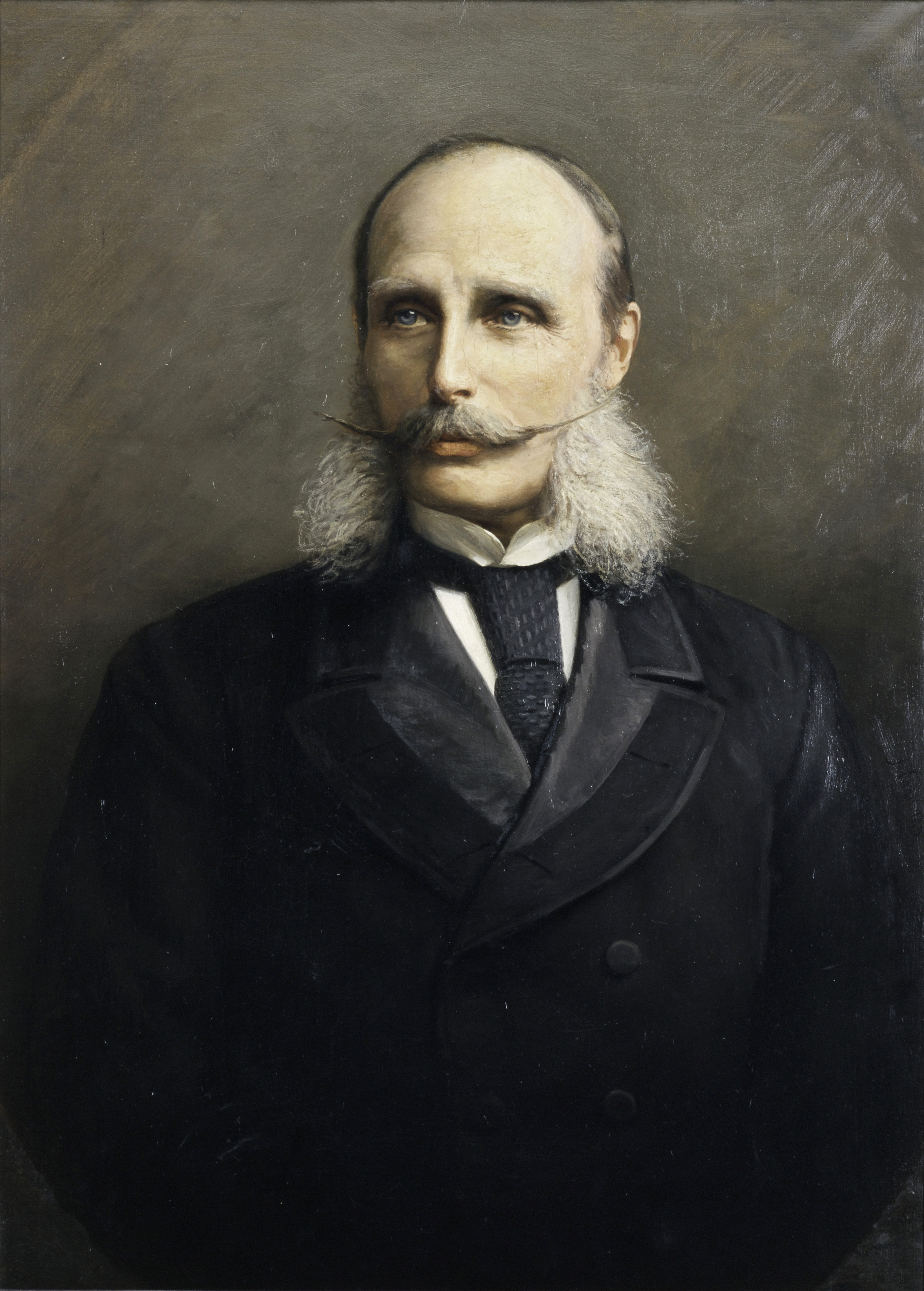 Portret van Hendrik, prins der Nederlanden (1820-1879)